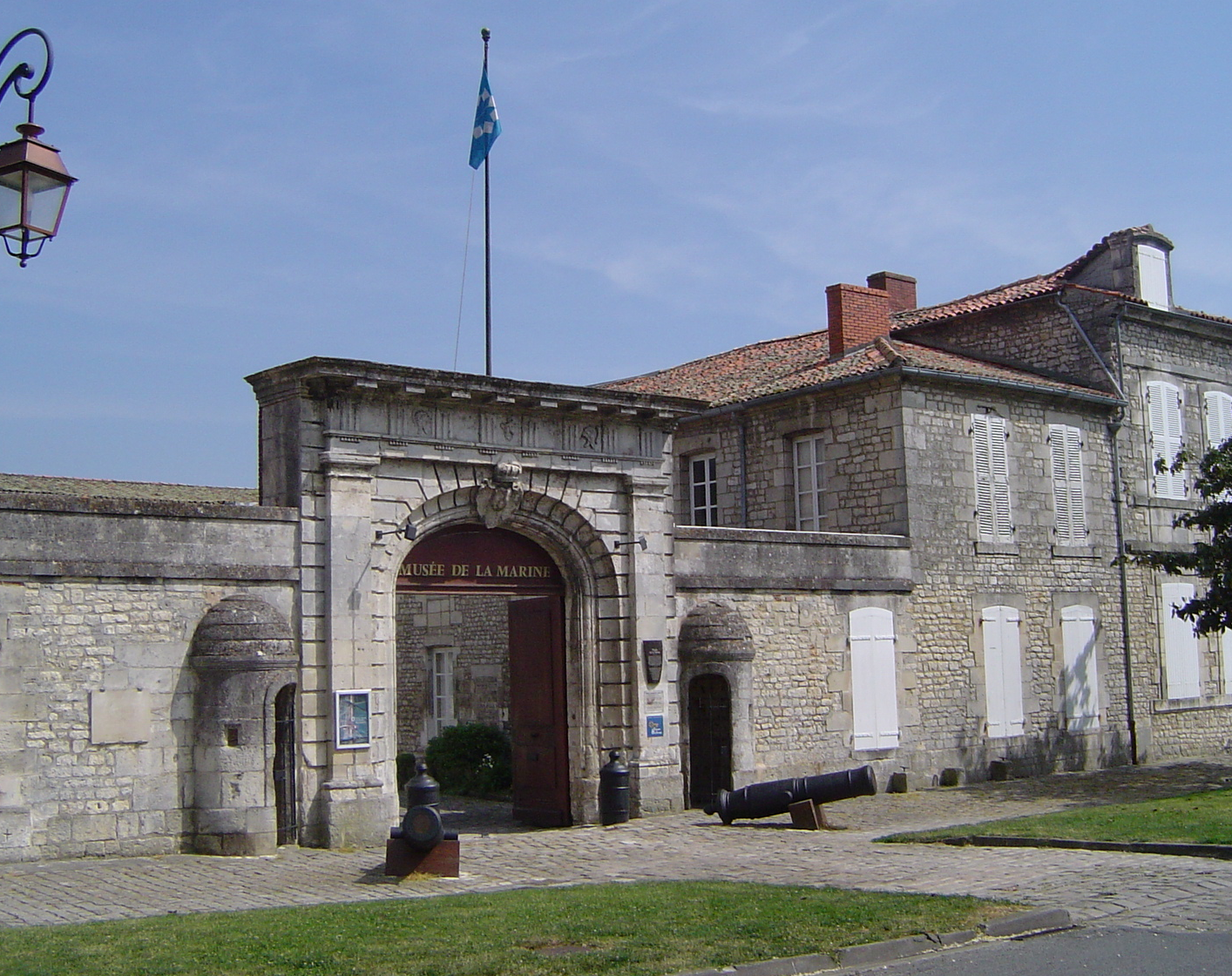 Musée de la Marine, aussi l'hôtel de Cheusses